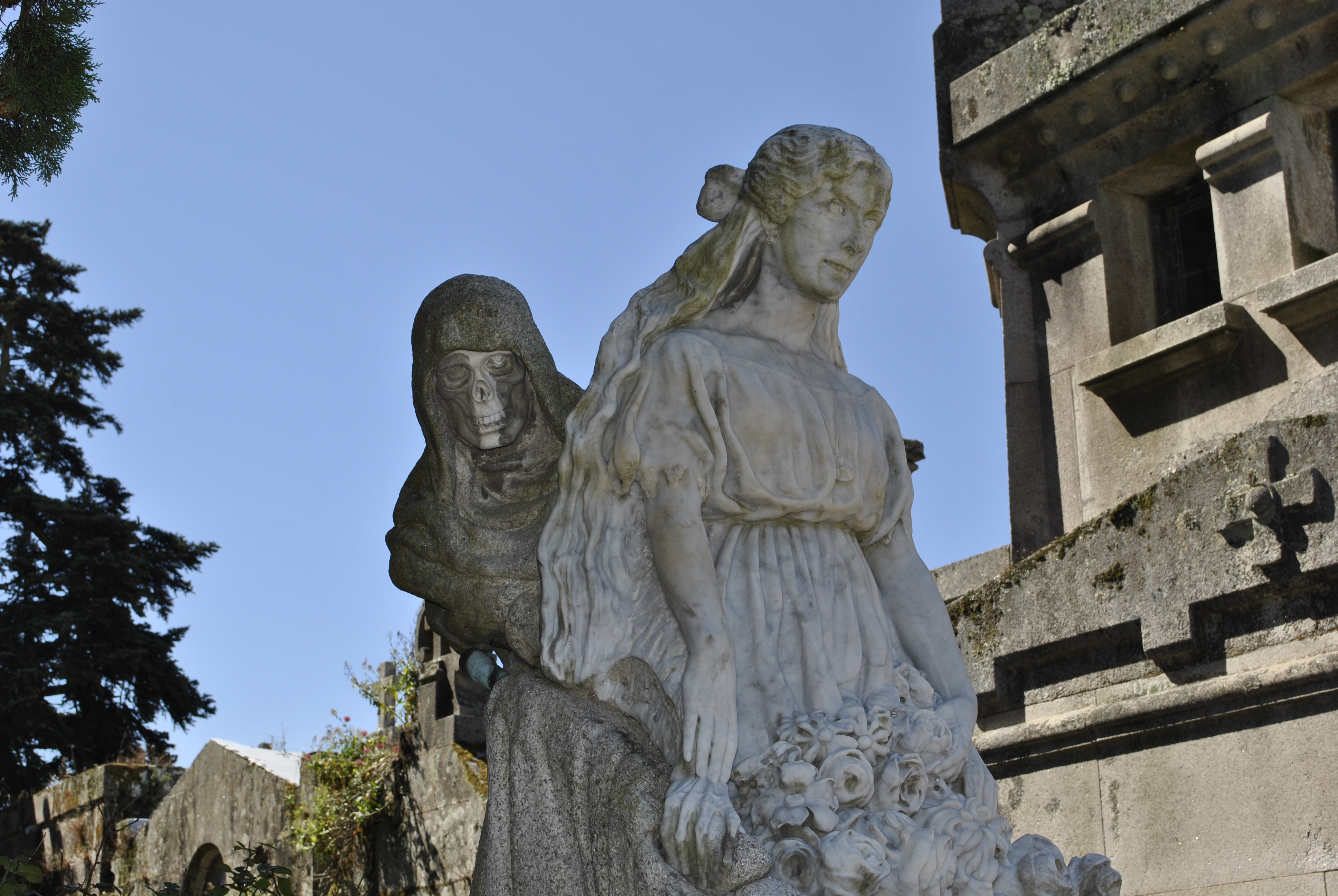 Pereiró, Asorey (4).jpg